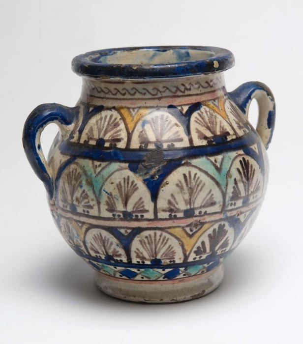 Het is waarschijnlijk gemaakt als sieraardewerk en niet voor huishoudelijk gebruik.